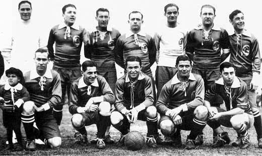 Club Atlético Independiente squad (with the National coat of arms of Argentina embroidered on jerseys chest) that defeated Spanish FC Barcelona 4-1 in Avellaneda. The national emblem was used due to a suggestion by then President of Argentina Hipólito Yrigoyen. Players are: fltr, (above): Ernesto Chiarella, Ernesto Bartolomedi, Carlos Debuglio, Néstor Sangiovanni (gk), Guillermo Ronzoni, Luis Martínez; (down): Zoilo Canaveri, Alberto Lalín, Luis Ravaschino, Manuel Seoane, Raimundo Orsi.